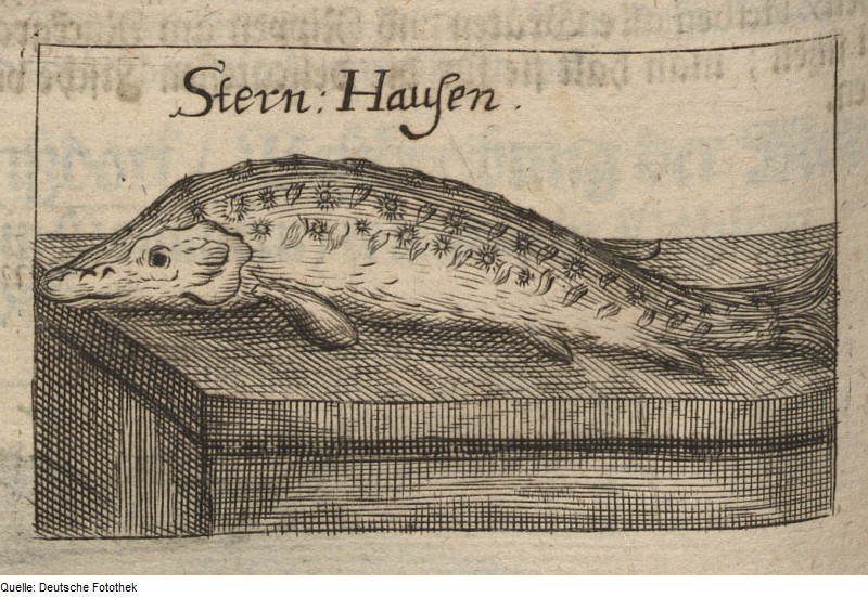 Original image description from the Deutsche Fotothek Fischwirtschaft & Fischerei & Fisch